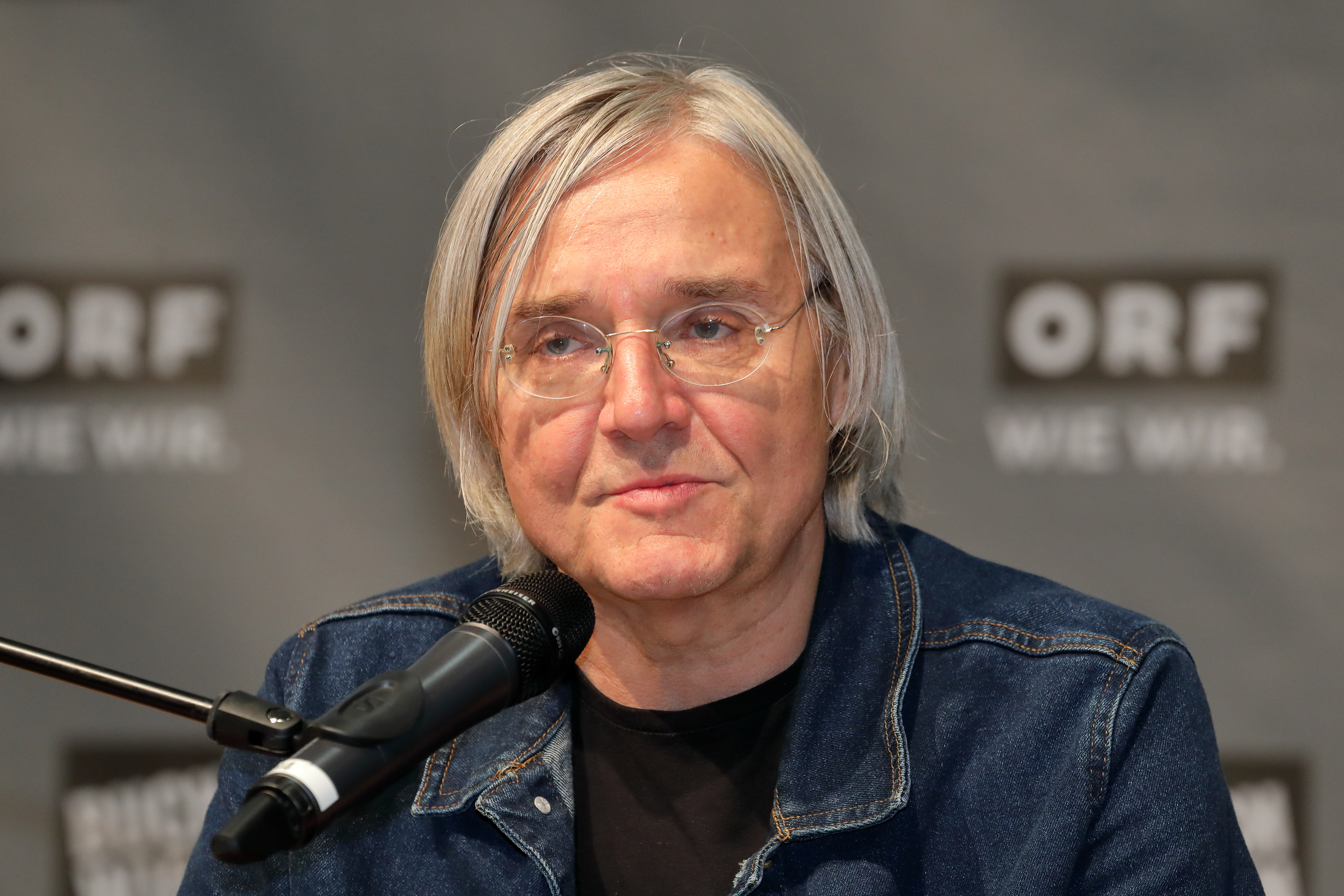 Der österreichische Schriftsteller und literarische Übersetzer Erich Hackl bei der Präsentation seines Buches „Am Seil - Eine Heldengeschichte“ auf der ORF-Bühne der Wiener Buchmesse 2018.